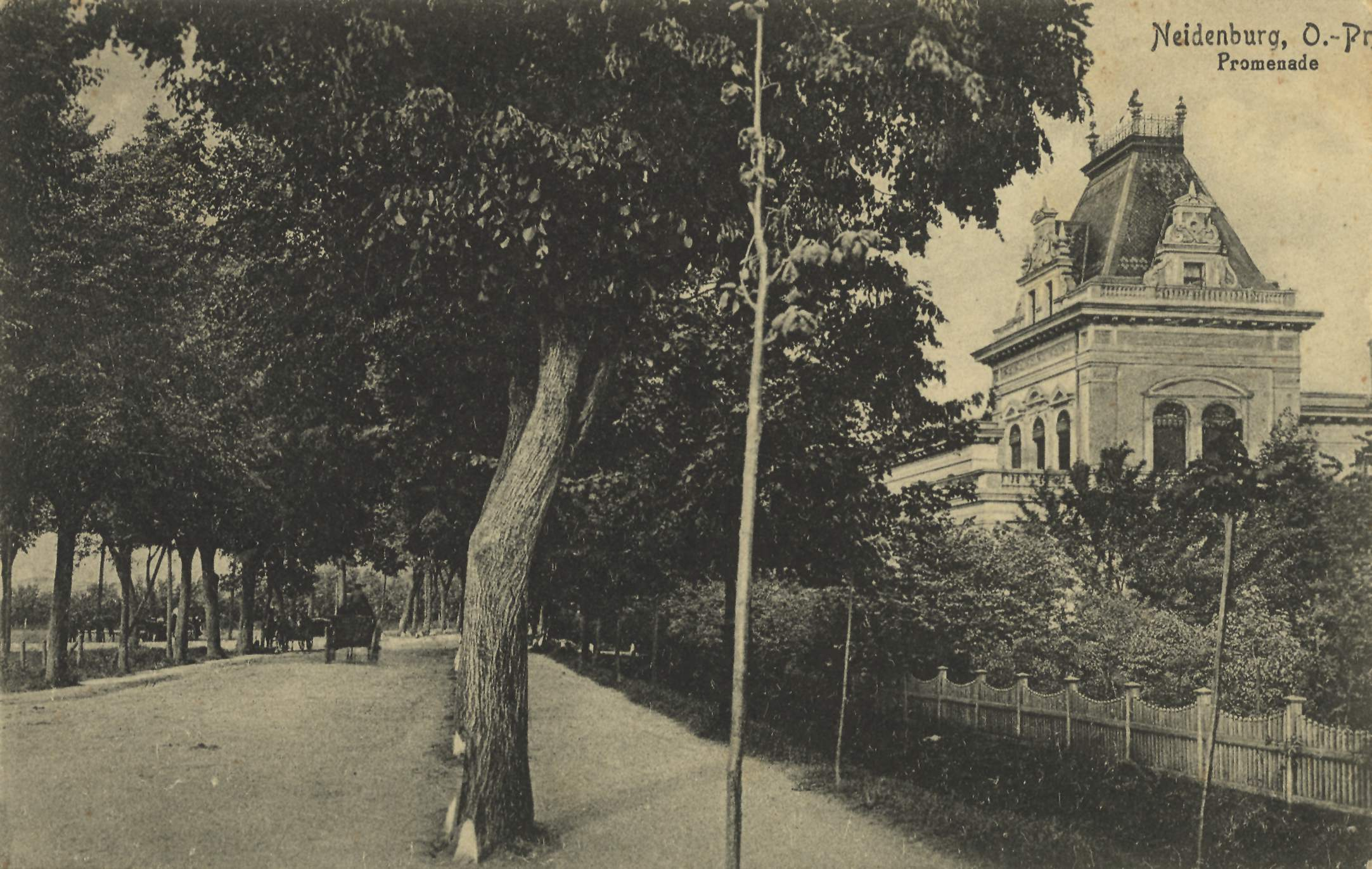 Promenade